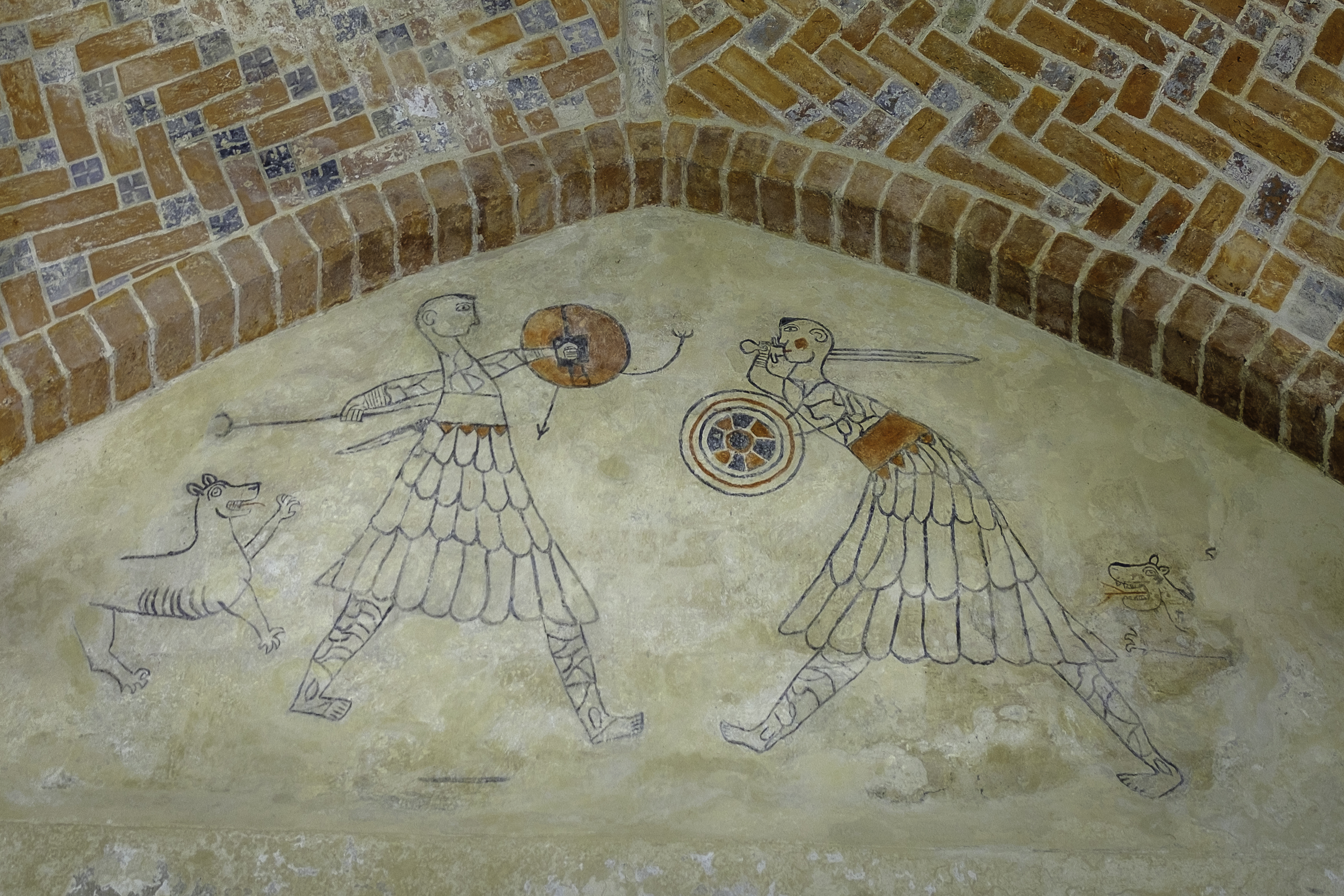 Friese kampvechters in de kerk van Westerwijtwerd. Schildering waarschijnlijk uit de 14e eeuw naar een 12e eeuws voorbeeld.